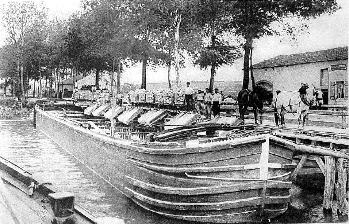 Chargement de calcaire sur la commune voisine en 1892 (carte postale)